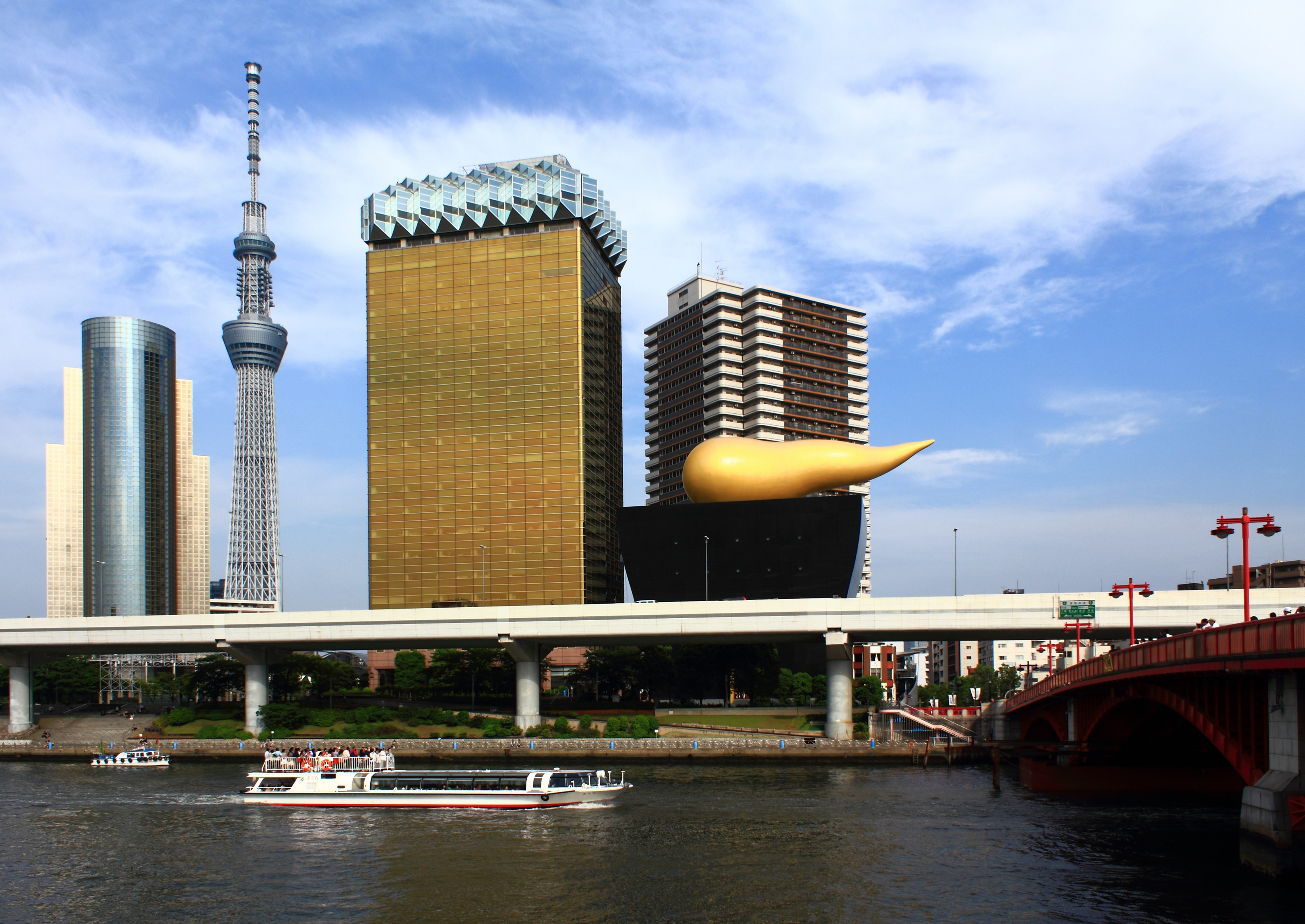 スカイツリー、アサヒビール本社、墨田区役所、さくら（東京水辺ライン）。吾妻橋より。